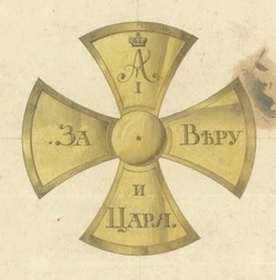 эскиз разработан по указанию главнокомандующего армиями князя М. И. Кутузова